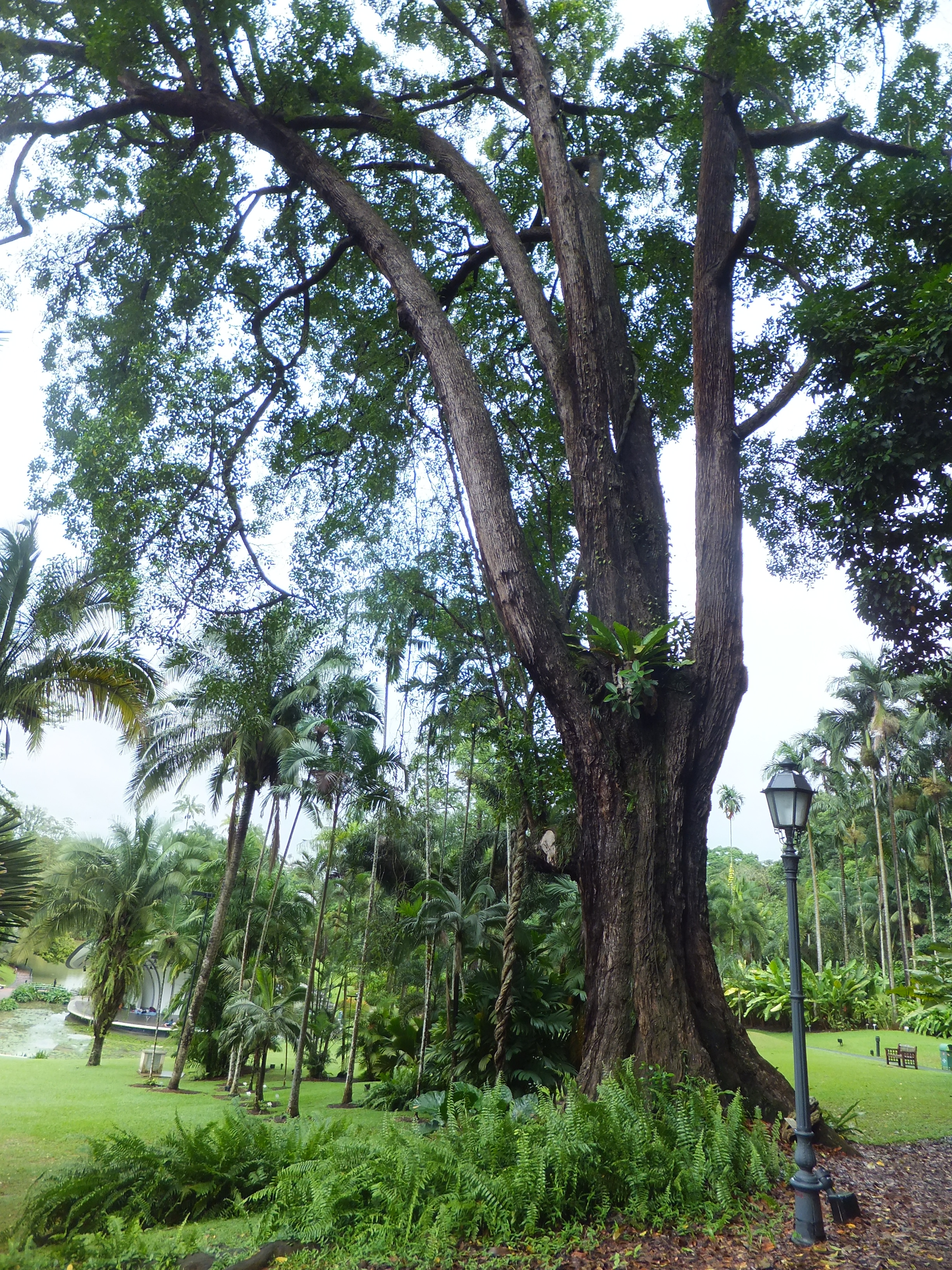 新加坡植物園棕櫚谷步道旁的香灰莉木（Tembusu），樹冠直徑5.3公尺、高32公尺，樹齡百年以上，新加坡的遺產樹之一。